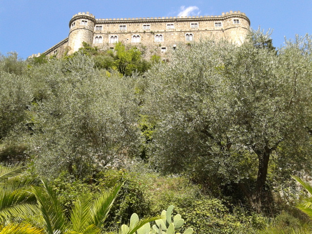 Castello di Balsorano visto dal basso